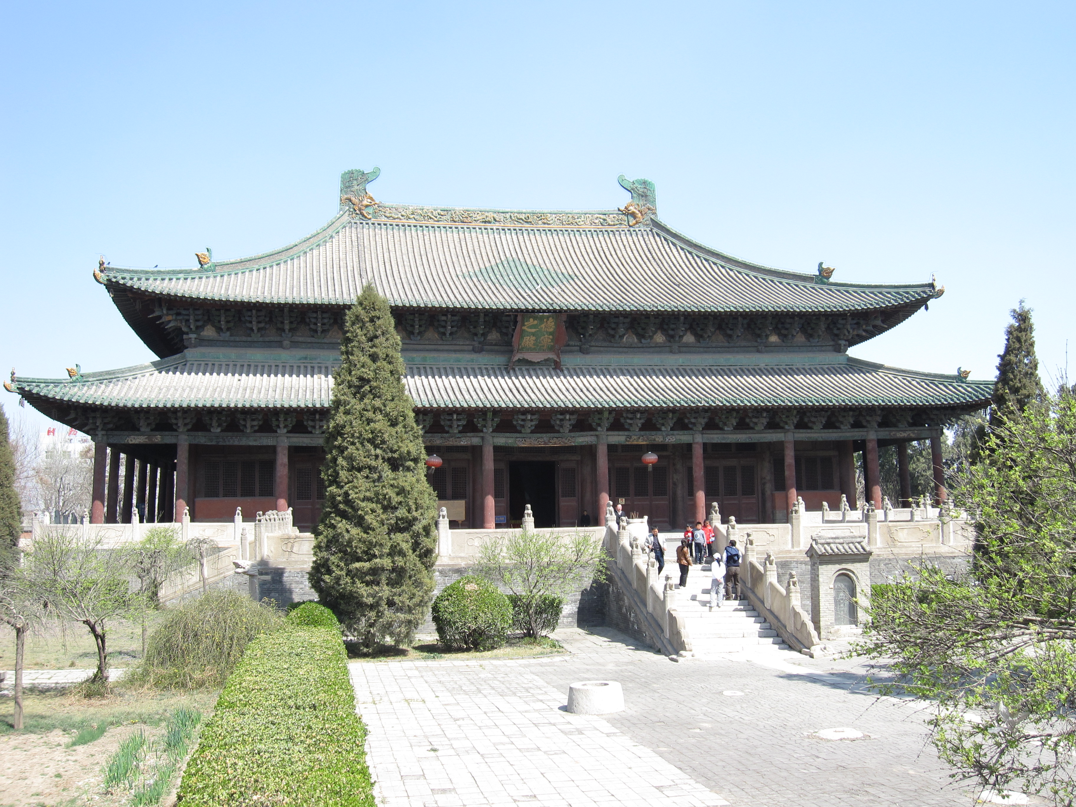 Beiyue Temple